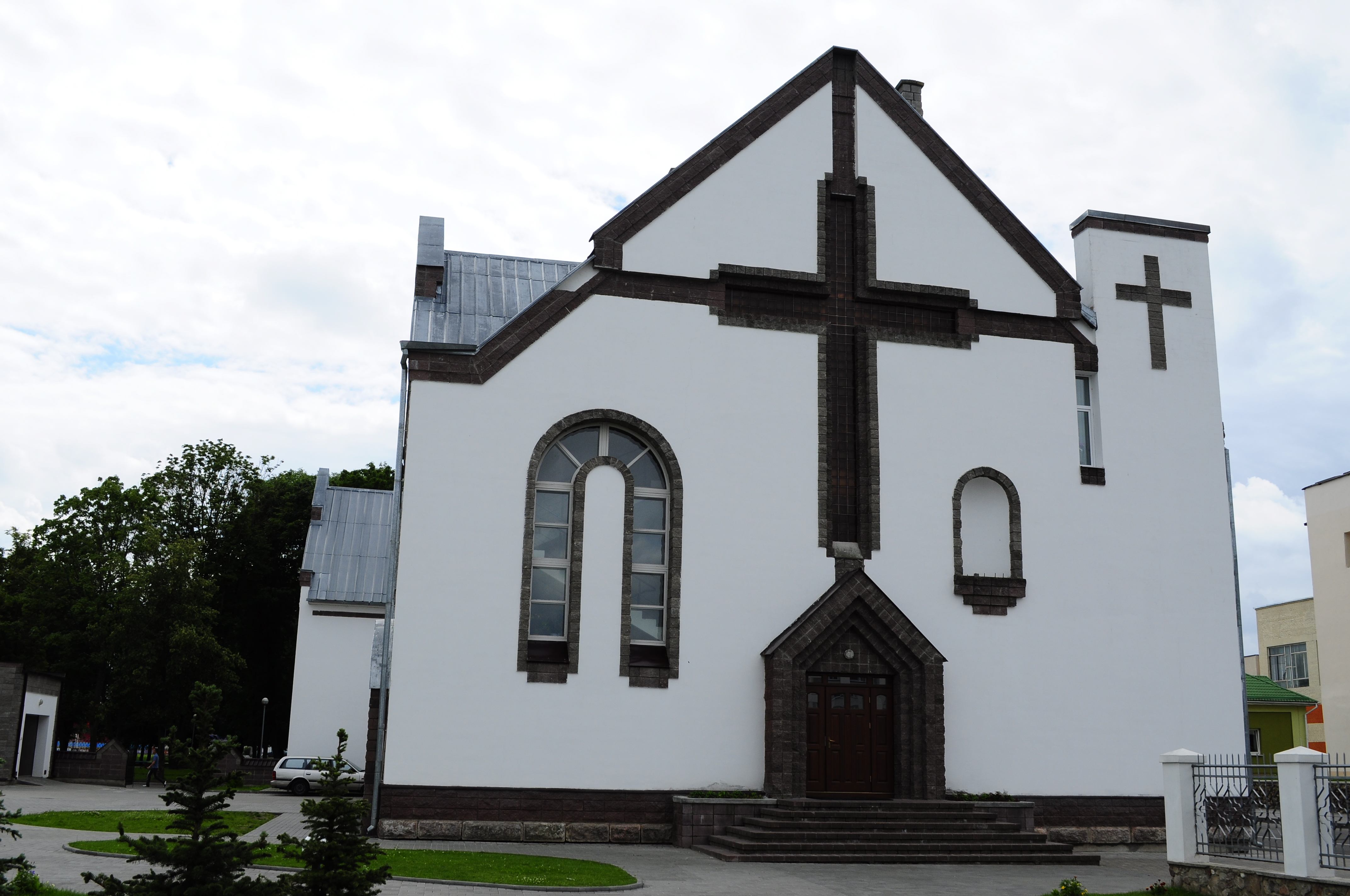 Беларуская (тарашкевіца): Смаргонь. касьцёл Сьв. Міхала Арханёла This is a photo of Belarusian heritage monument. Reference number: 412Г000585 ( WLM)